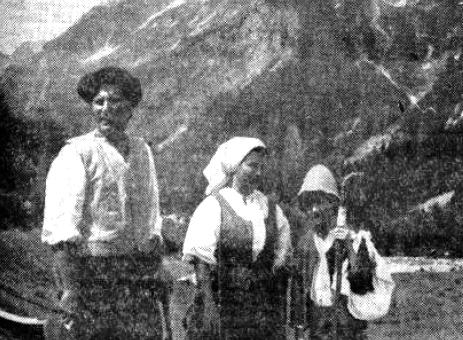 Prizor iz filma Srečno Kekec